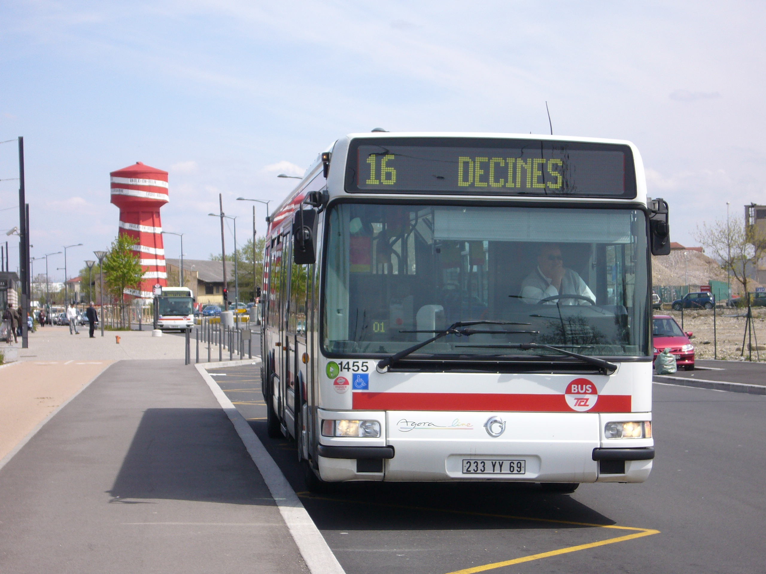 Photo d'un bus de la ligne 16 à Vaulx en Velin La Soie en 2008